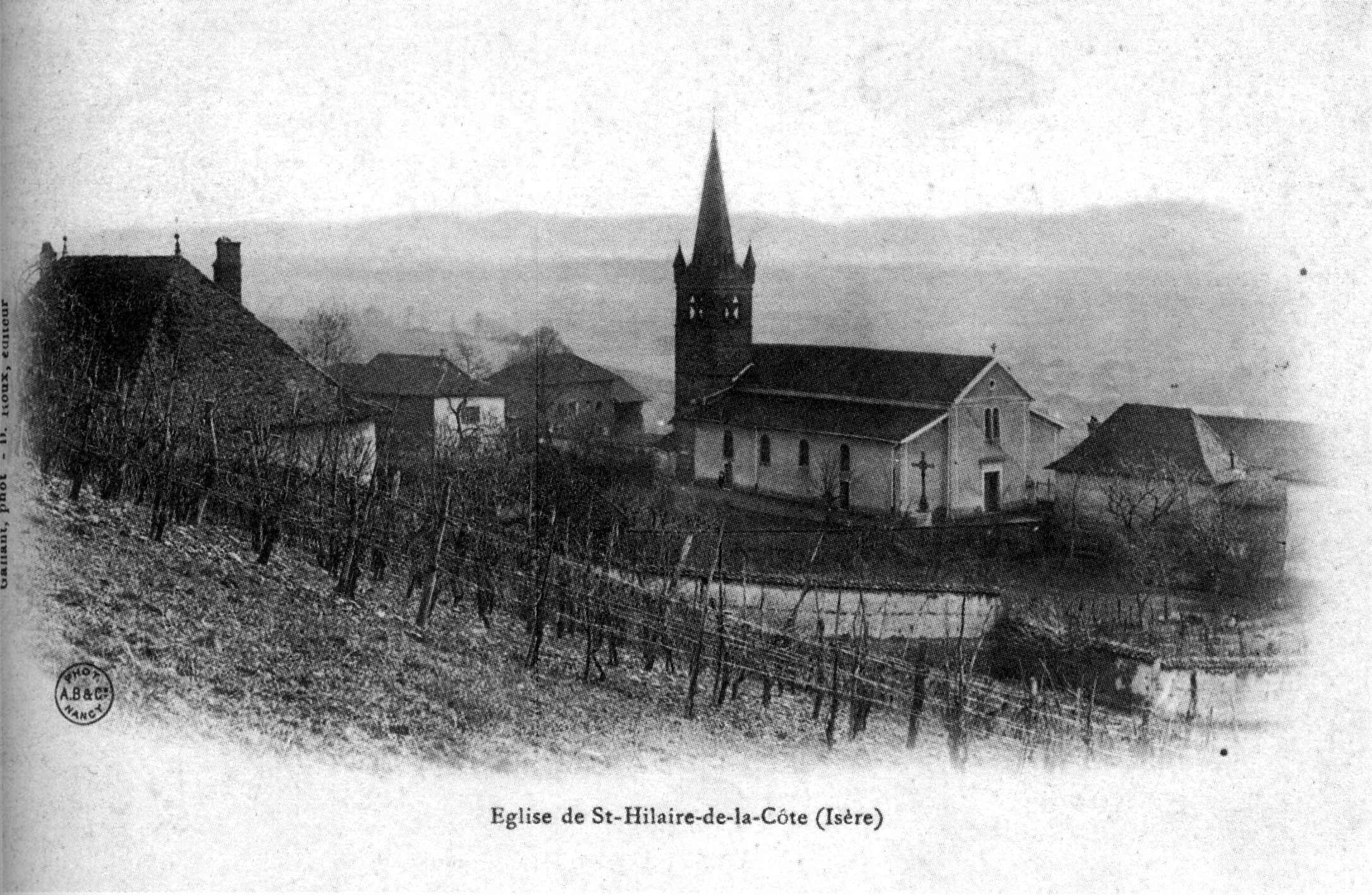 Saint-Hilaire-de-la-Côte, église, 1904